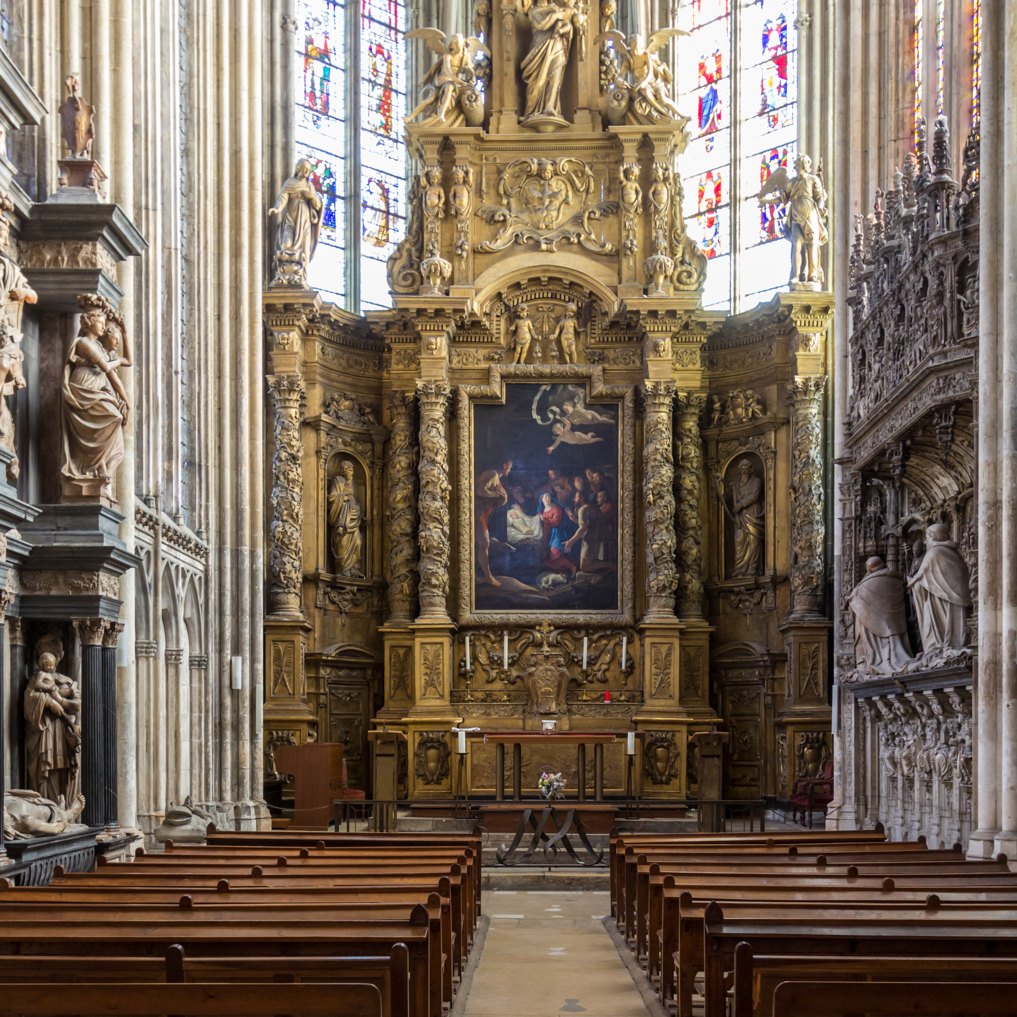 Chapelle de la Vierge, Cathédrale Notre-Dame de Rouen